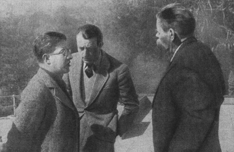 Malraux en URSS, entre les écrivains soviétiques Koltzov (à gauche) et Maxime Gorki (à droite), hebdomadaire "Marianne", 15 avril 1936.